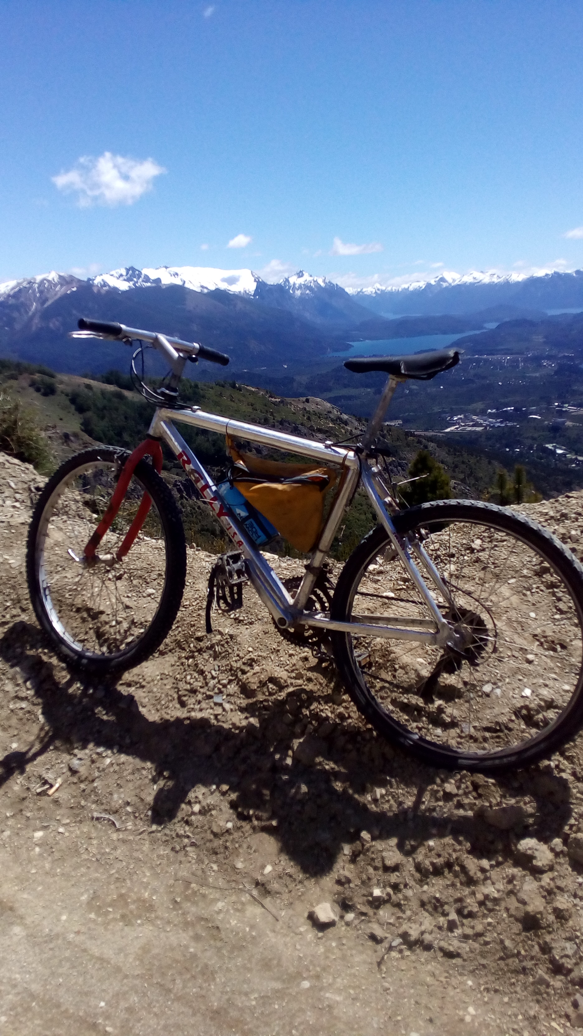 mountain bike en cumbre del cerro Otto